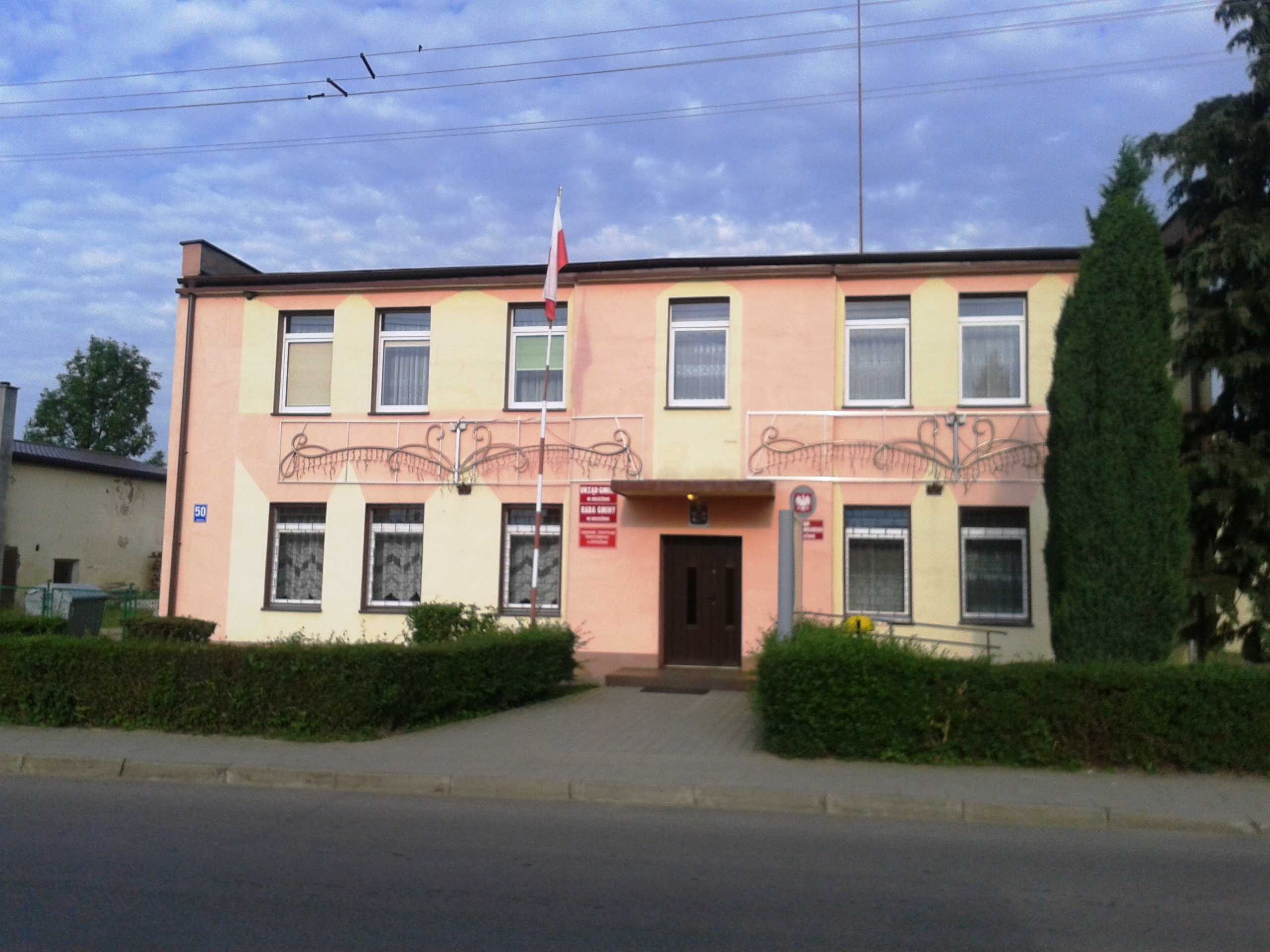 Brzeżno - Urząd Gminy